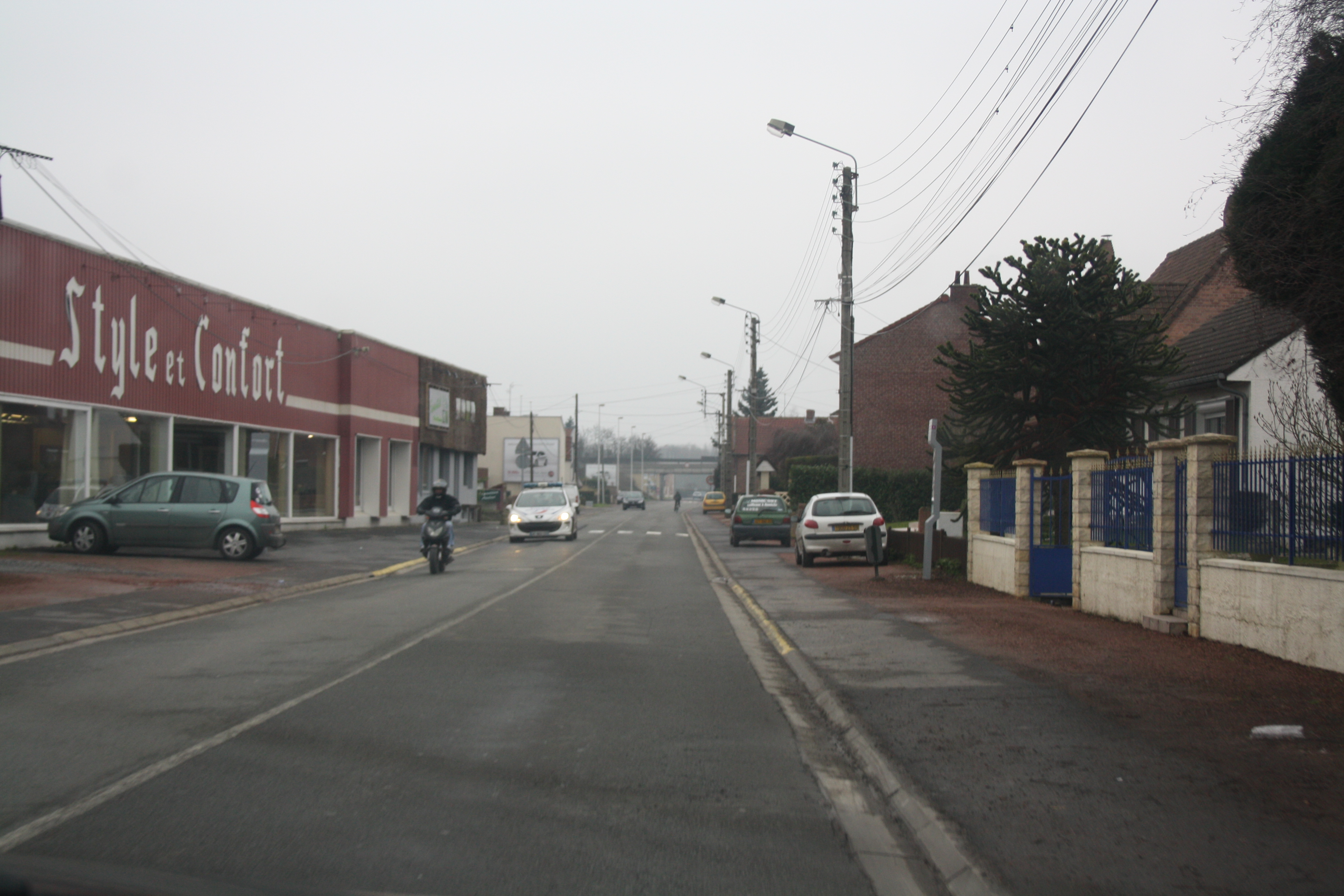 Limite Nord de Flers-en-Escrebieux (France).